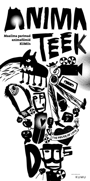 Animateek plakat